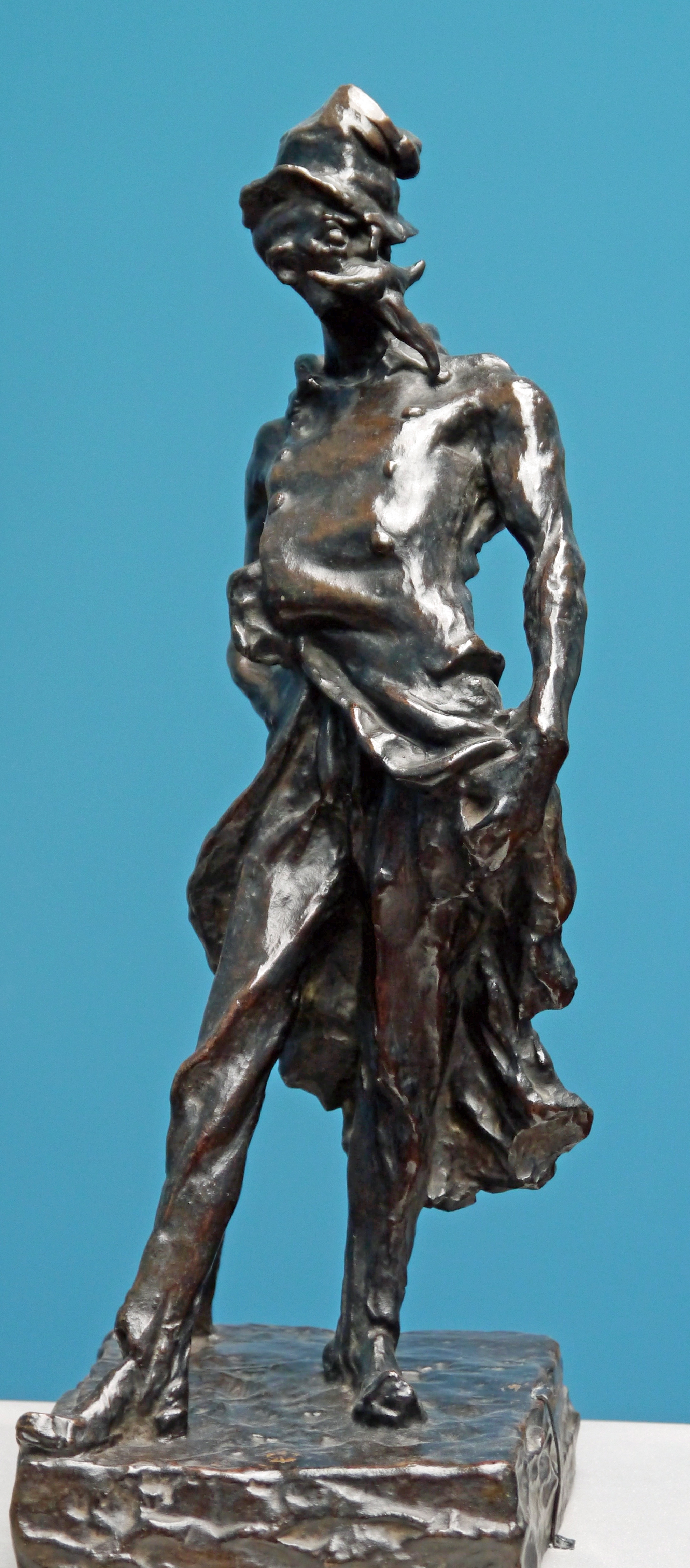 Ratapoil, Plastik von Honore Daumier im Staedel in Frankfurt am Main.